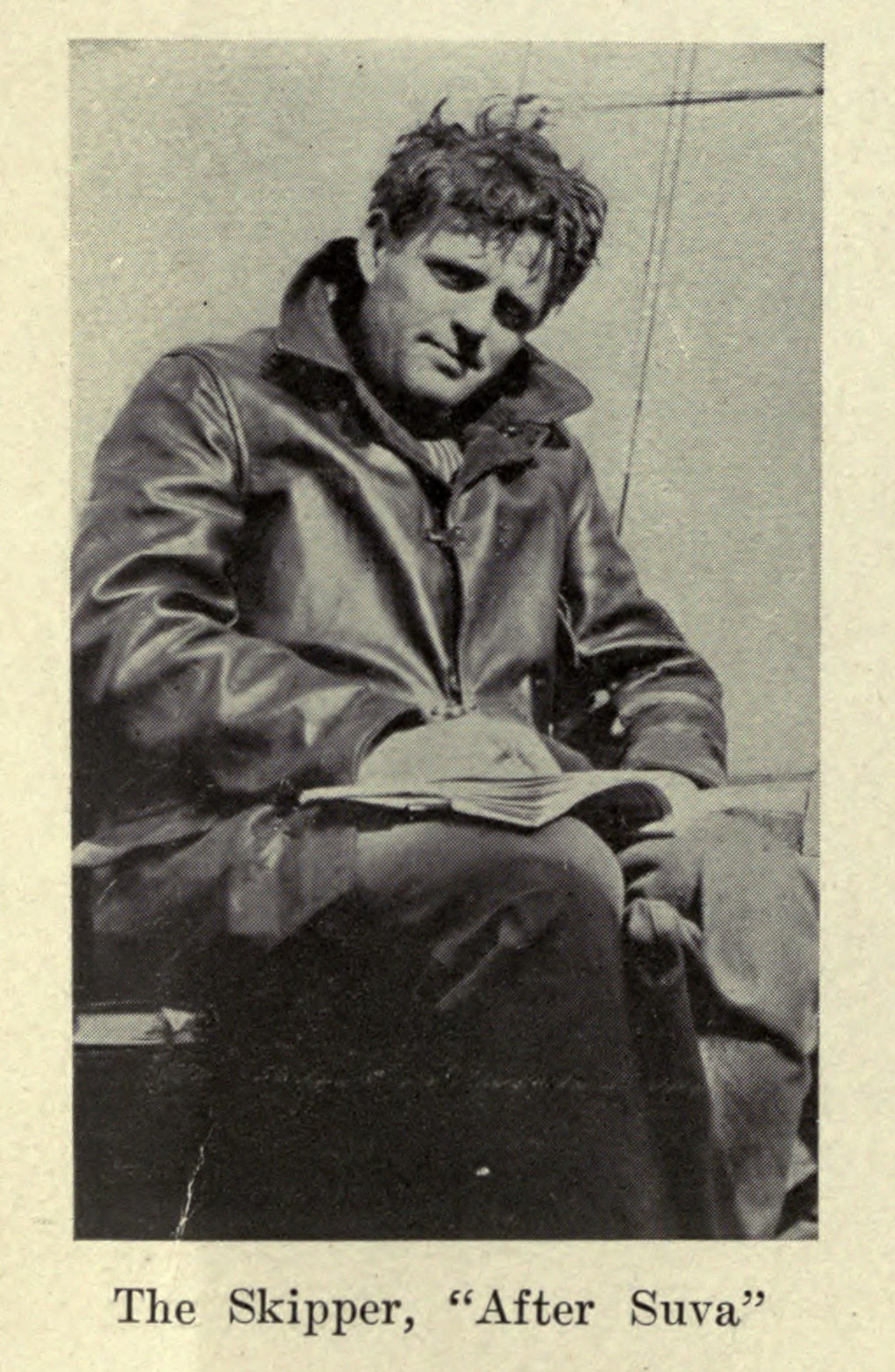 Portrait de l'écrivain Jack London lors de sa croisière sur le Snark (1907-1908). Image extraite du fichier Snarklogof00londrich 0004.jpg.